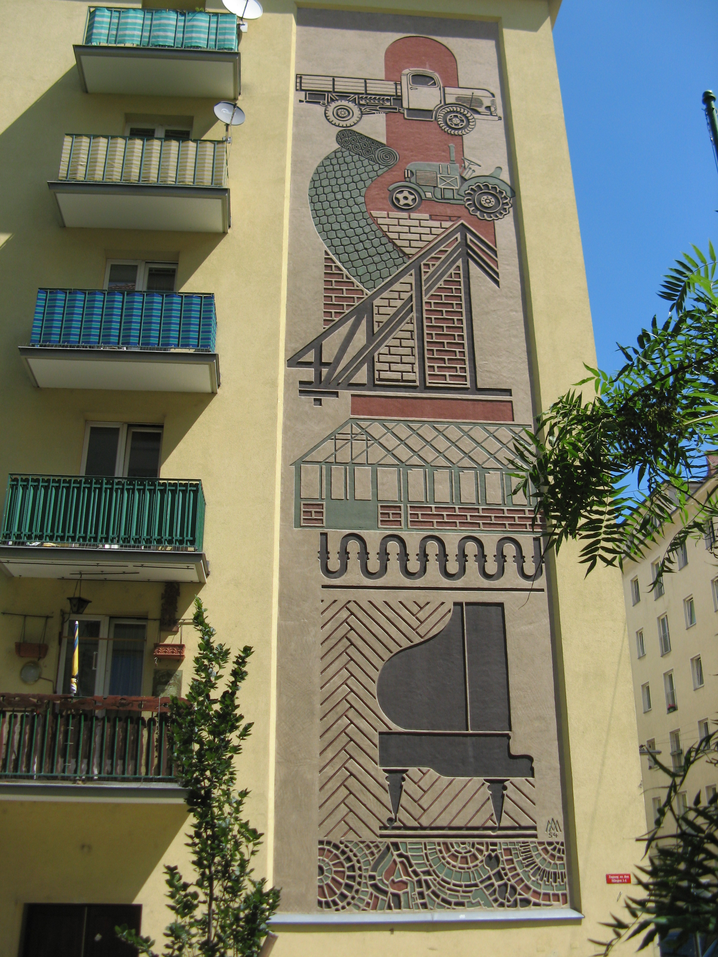 Technik (1954), Sgraffito von Hermine Aichenegg, Alxingergasse 96, Wien-Favoriten